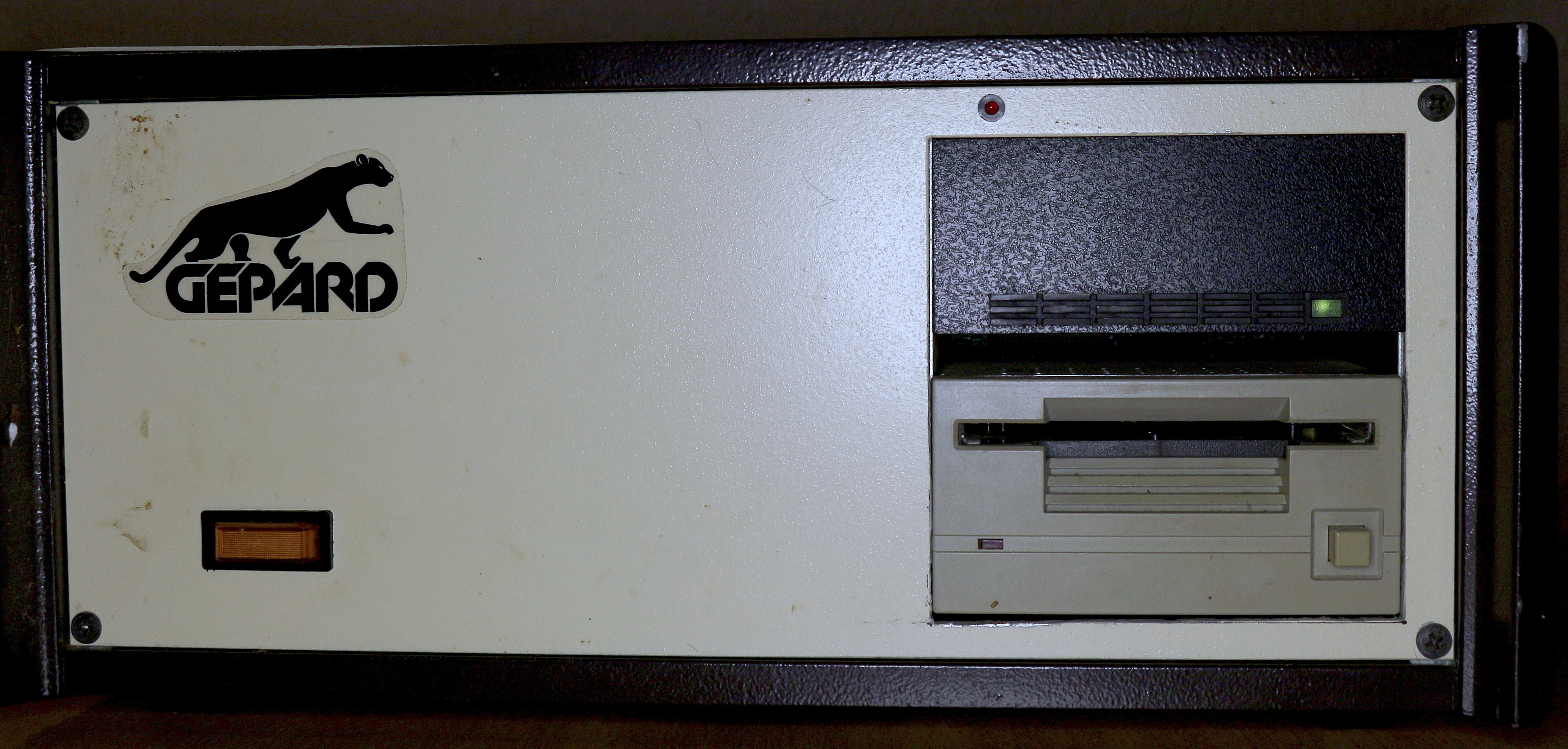 Beschreibung folgt